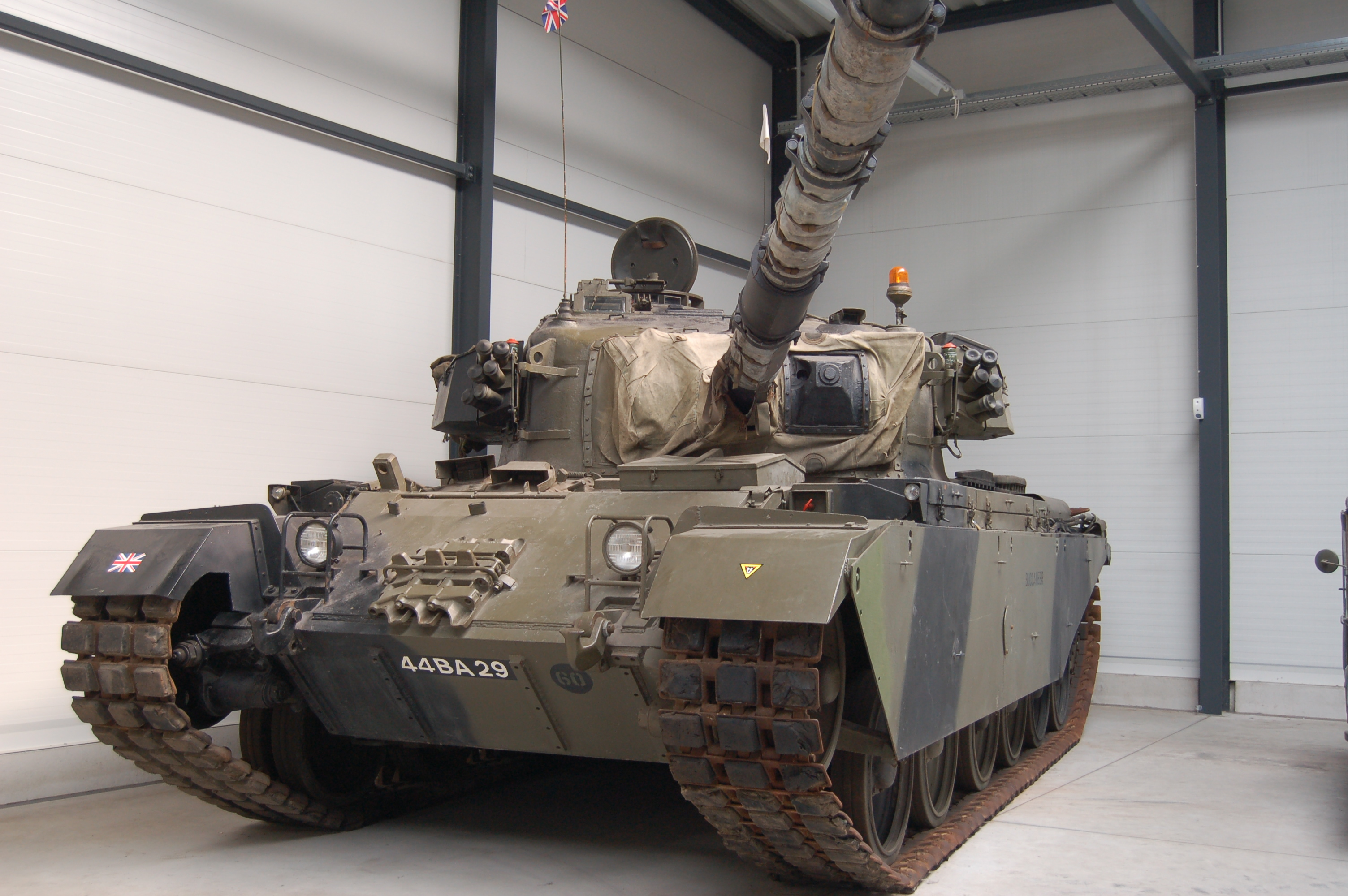 Mittlerer Kampfpanzer "Centurion MK 12" (Großbritannien) Besatzung: 4 Soldaten Gewicht: 51,8 Tonnen Motorleistung: 478 kW (650 PS) Bewaffnung: 1 BK 105 mm L/51, sowie Bug - Koaxial - Fla - MG, Kaliber: 7,62 mm x 51 Baujahr: 1945 - 1962 Stückzahl: 4.500